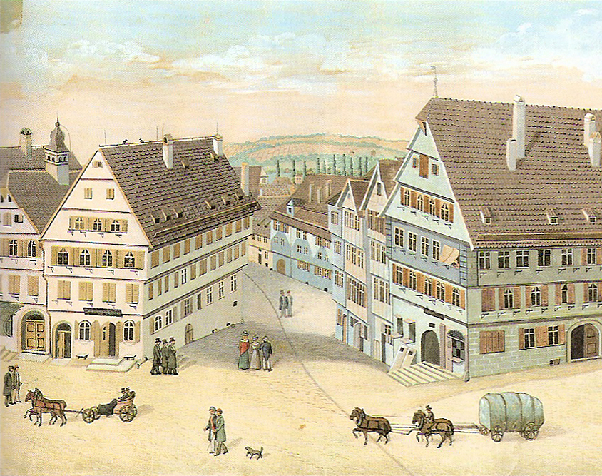 Die Hirschgasse in Tübingen, gesehen von der Kirchgasse (Gouache 22,2 x 30,1 cm)